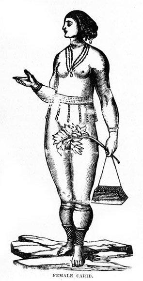 Dibujo de una mujer de la etnia de los caribe de las Islas Vírgenes realizado por Charles Edwin Taylor y publicado en 1888, cortesía de la Prints and Photographs Division de la Biblioteca del Congreso Estadounidense (dominio público)